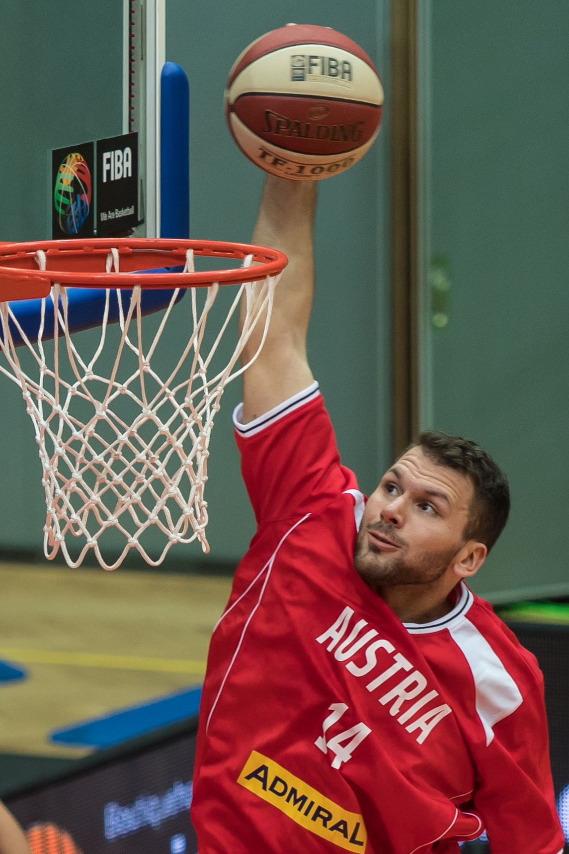 ÖBV Vier-Nationen-Turnier vom 12.-14. August 2016 in Schwechat - Österreich vs Polen. Bild zeigt Jozo Rados (AUT) beim Warmup.